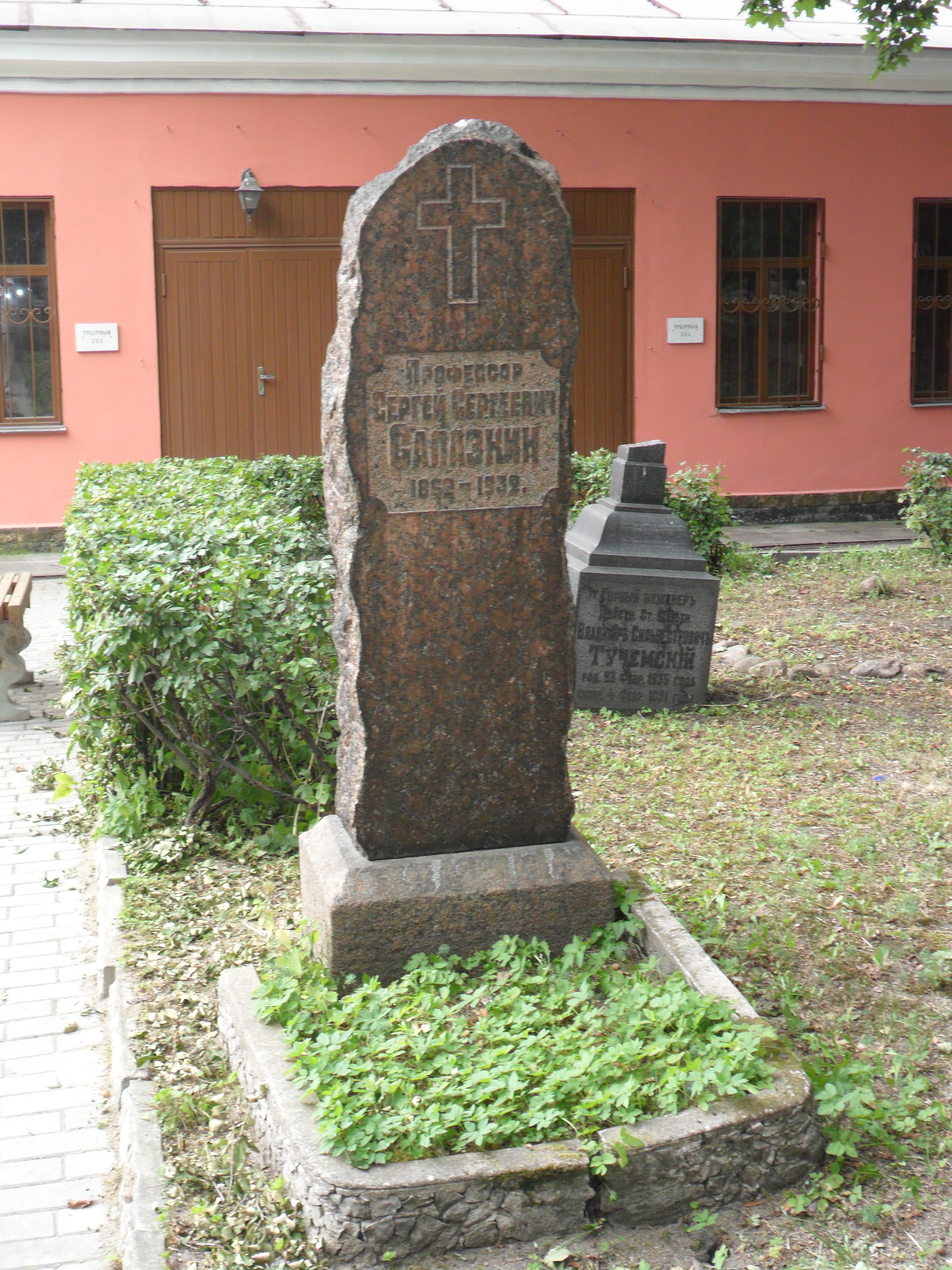 Могила профессора медицины Сергея Сергеевича Салазкина на кладбище Новодевичьего монастыря в Санкт-Петербурге